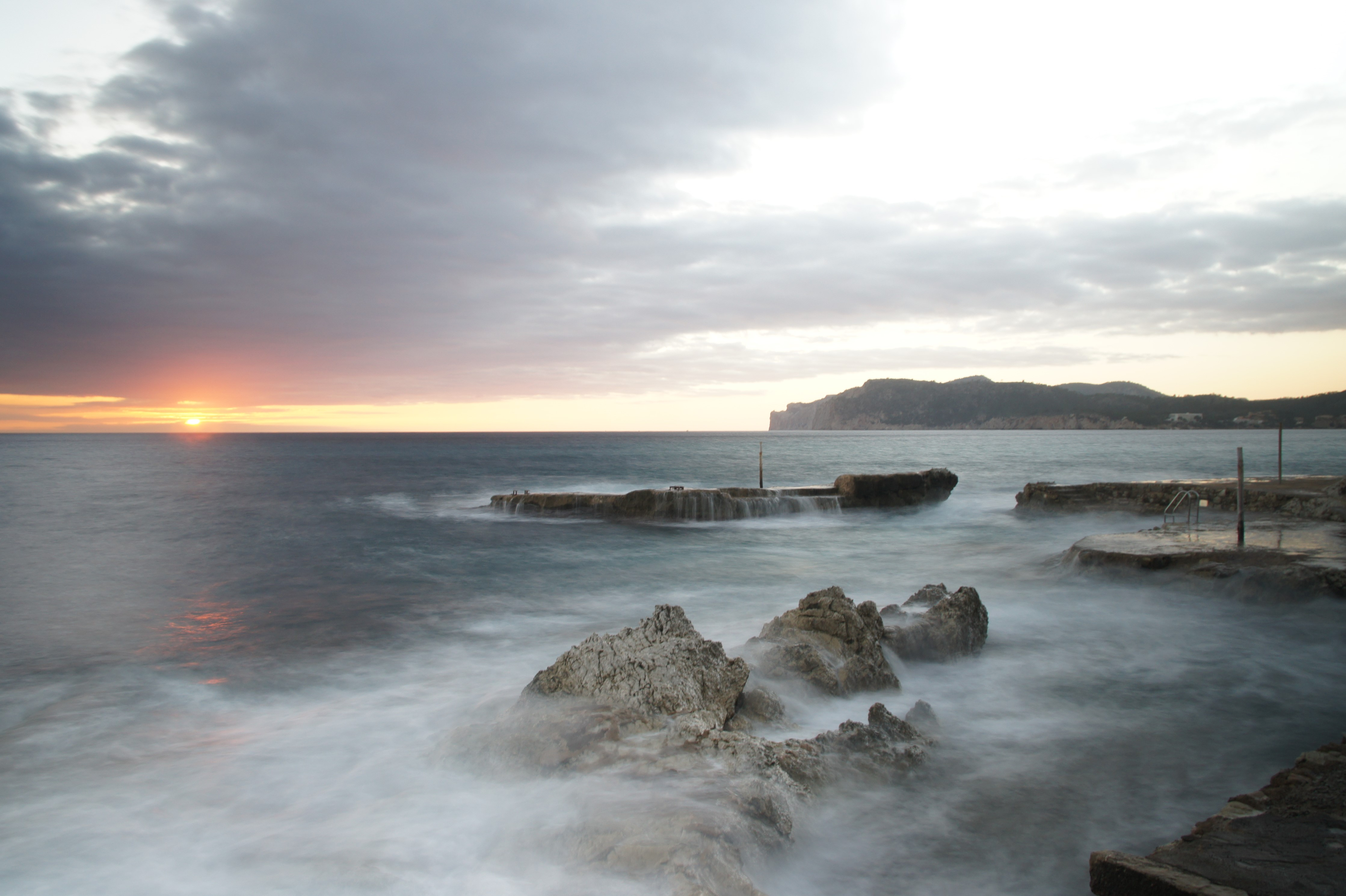 atardecer con un pequeño temporal